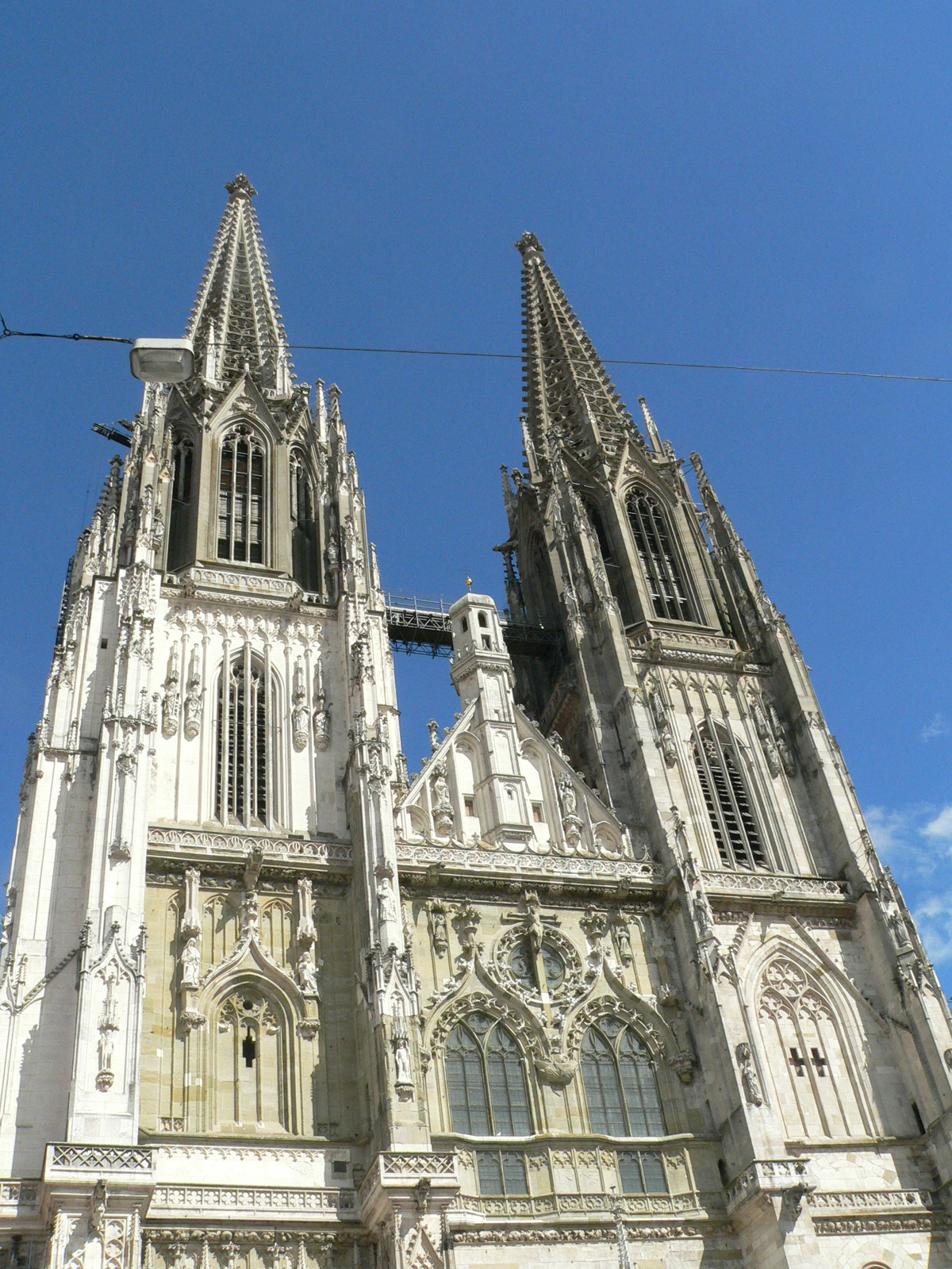 Regensburg, Szent Péter-dóm